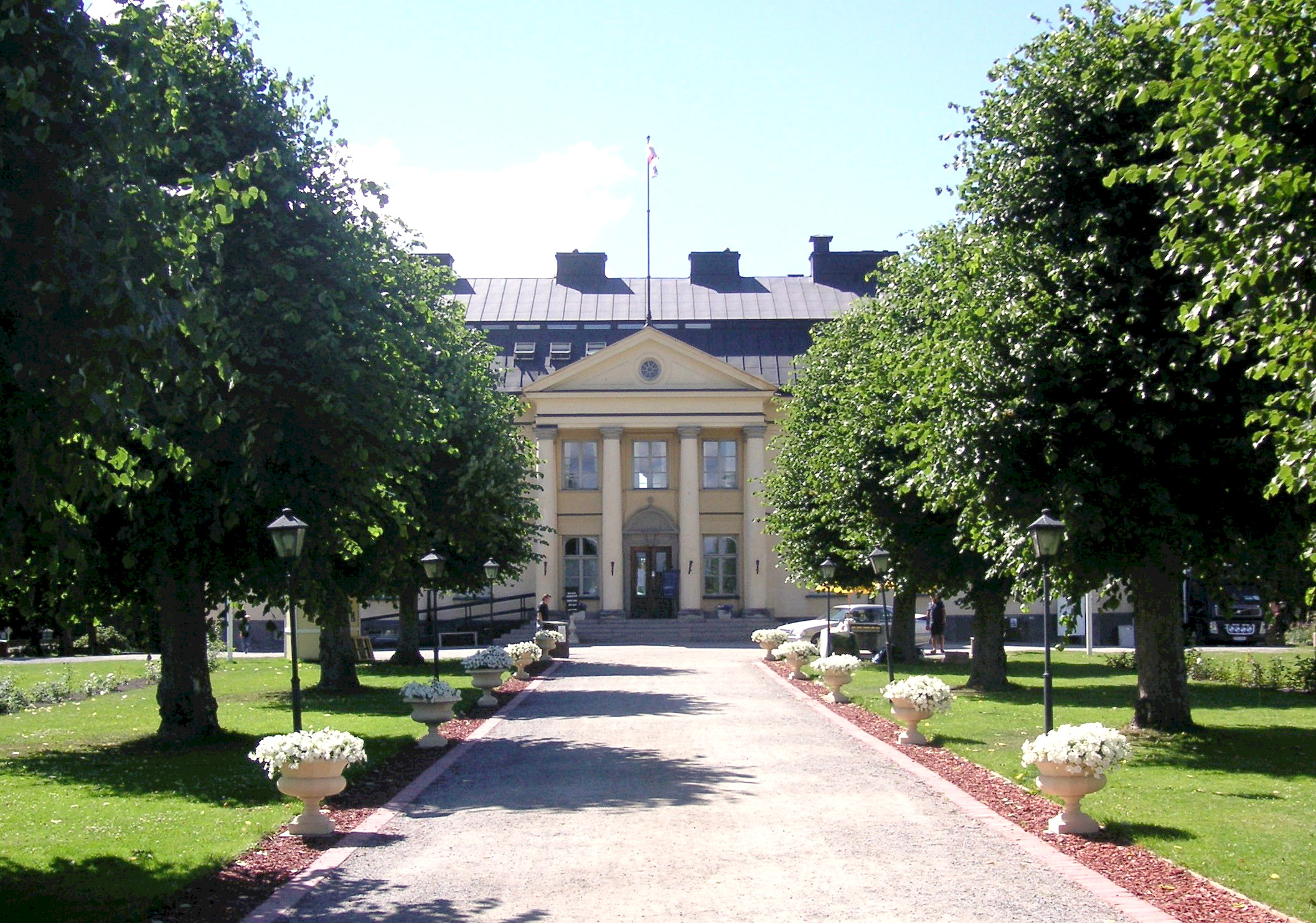 Hågelby gård, huvudbyggnad